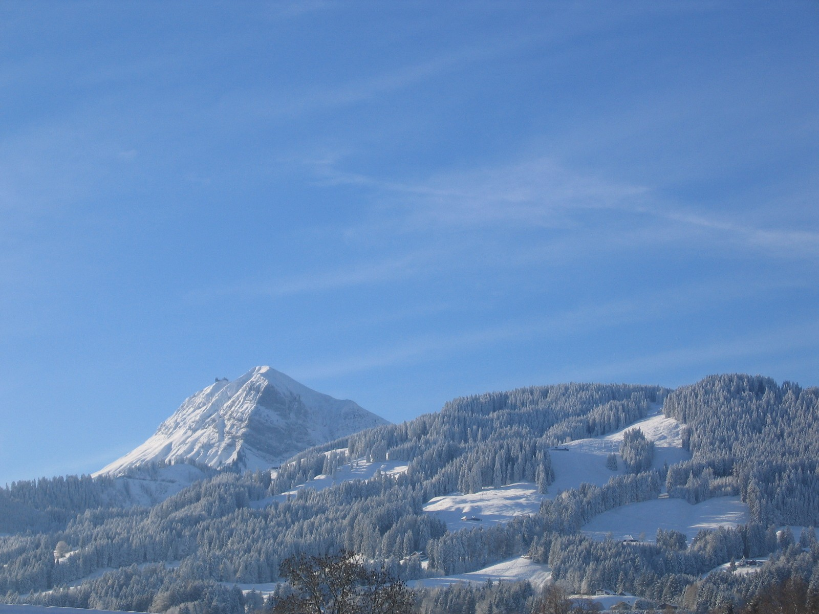 Moléson